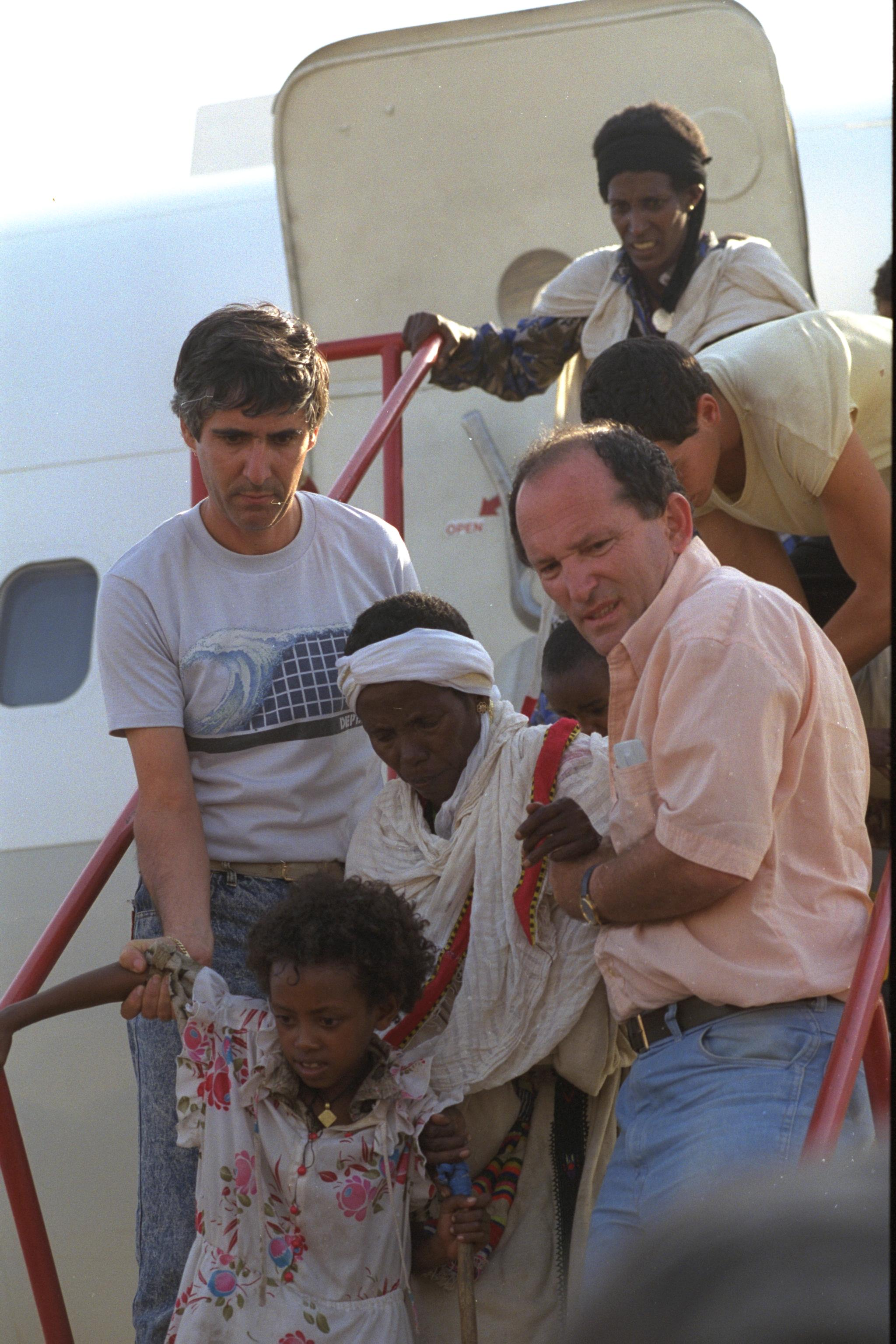 GROUND CREWS HELPING FIRST OF "OPERATION SOLOMON" IMMIGRANTS FROM ETHIOPIA OFF THE PLANE, AT AN AIR FORCE BASE. צוותי נמל התעופה מסייעים לעולים חדשים מאתיופיה לרדת מן המטוס